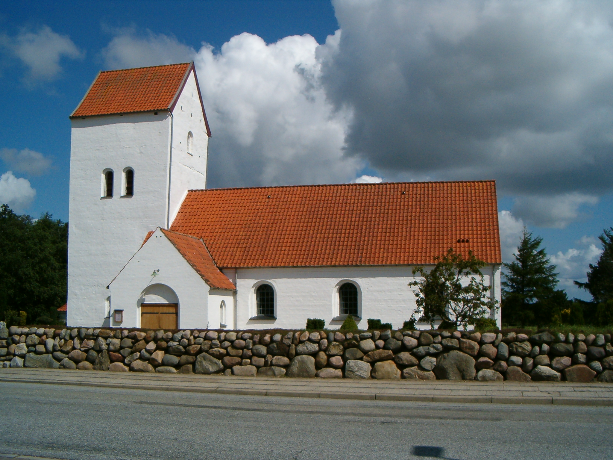 Resen Kirke